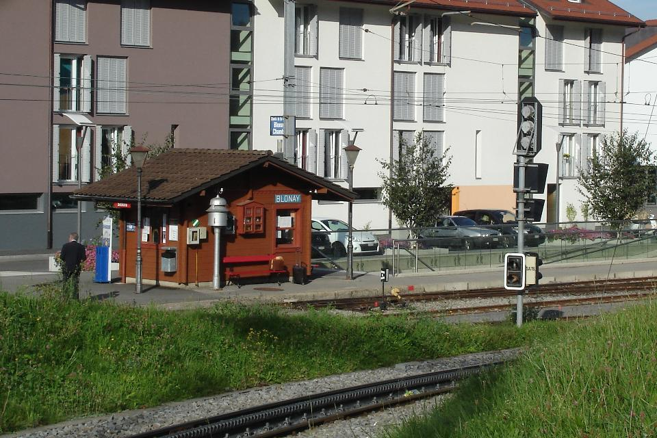 Einer der beiden Endpunkte der Museumsbahn Blonay–Chamby (BC): Blonay. Im Hintergrund links, der Bahnhof der Museumsbahn. Im Vordergrund Zahnradbahnstrecke System Abt von Blonay nach Les Pléiades. Rechts auf dem Bild nicht mehr sichtbar findet sich der Bahnhof der Transports Montreux–Vevey–Riviera (MVR).